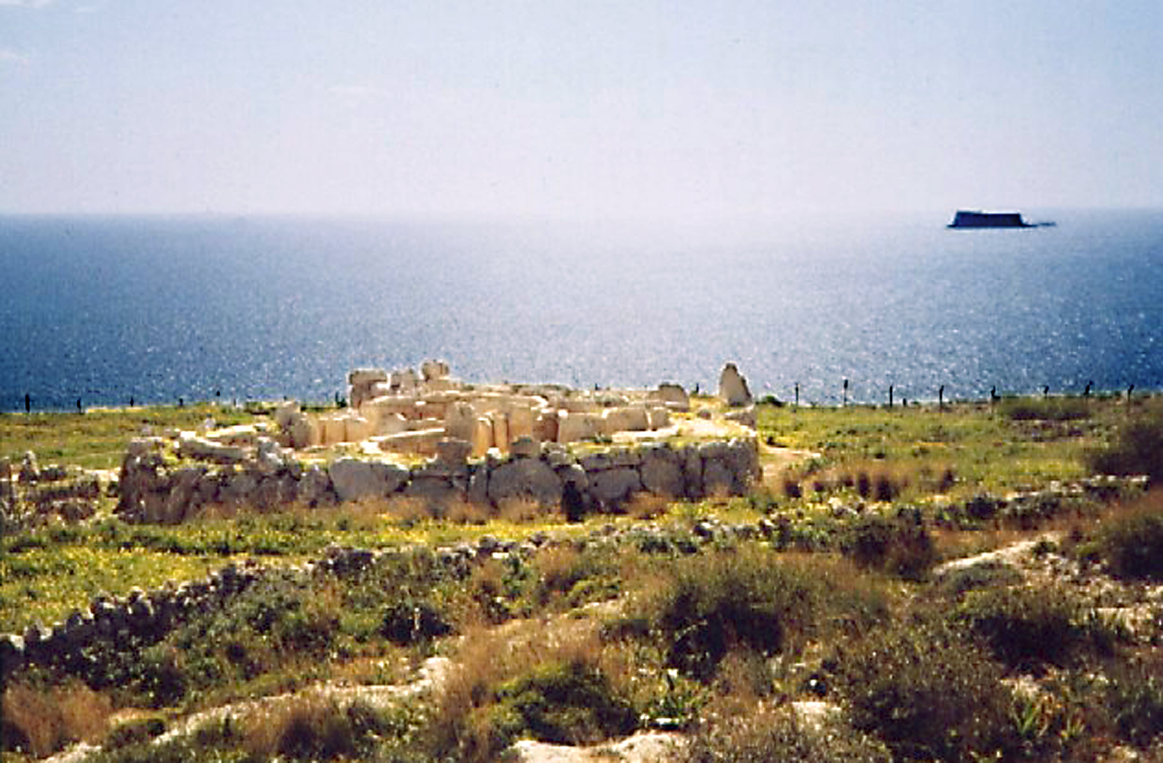 temple de Mnajdra avec en fond l'îlot de Filfla